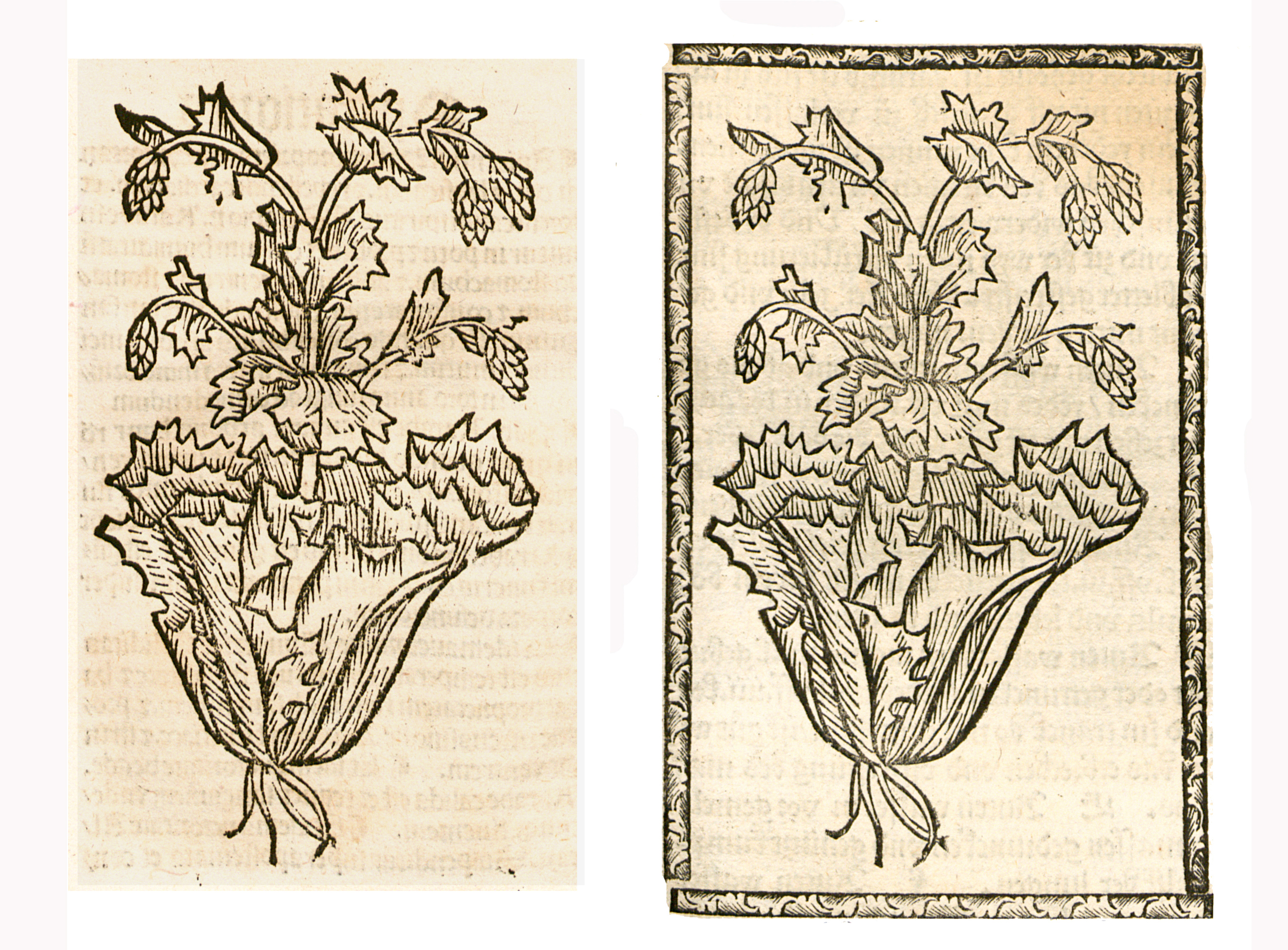 Abbildung von:Römscher Köl (Brassica)